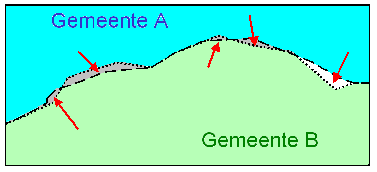 Slivers. De figuur toont versimpeld wat slivers (overlappen en gaten) zijn bij naburige vlakken